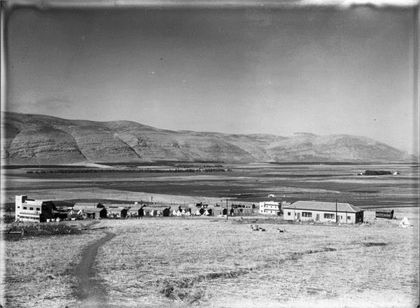 בית השיטה - מראה (פנורמה).